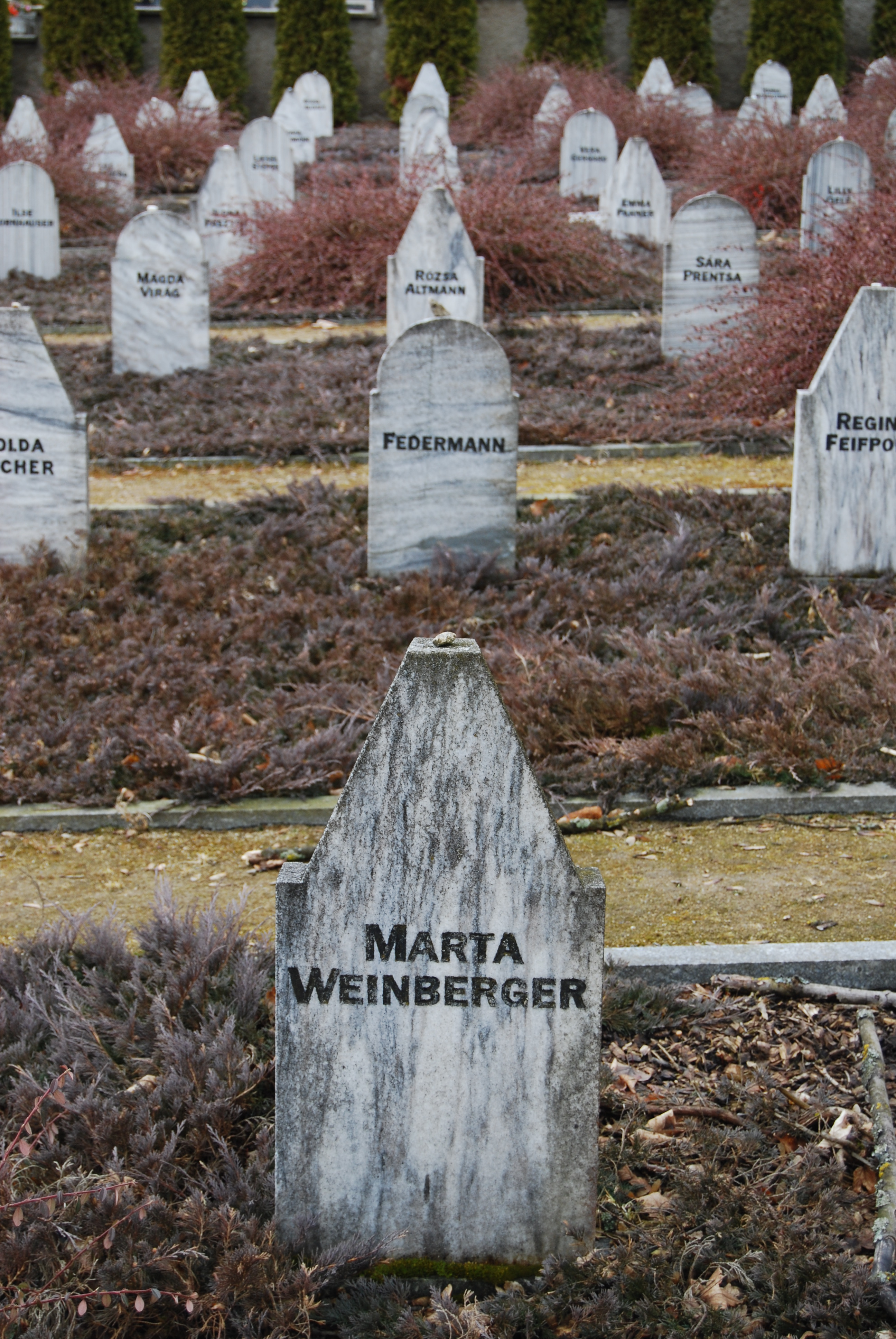 Pietní památník a hřbitov převážně židovských žen na Zlaté stezce. Jednotlivé náhrobky. Volary. Okres Prachatice. Česká republika.